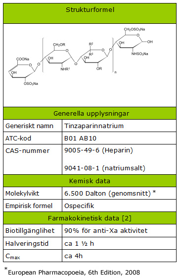 Tinzaparinnatrium